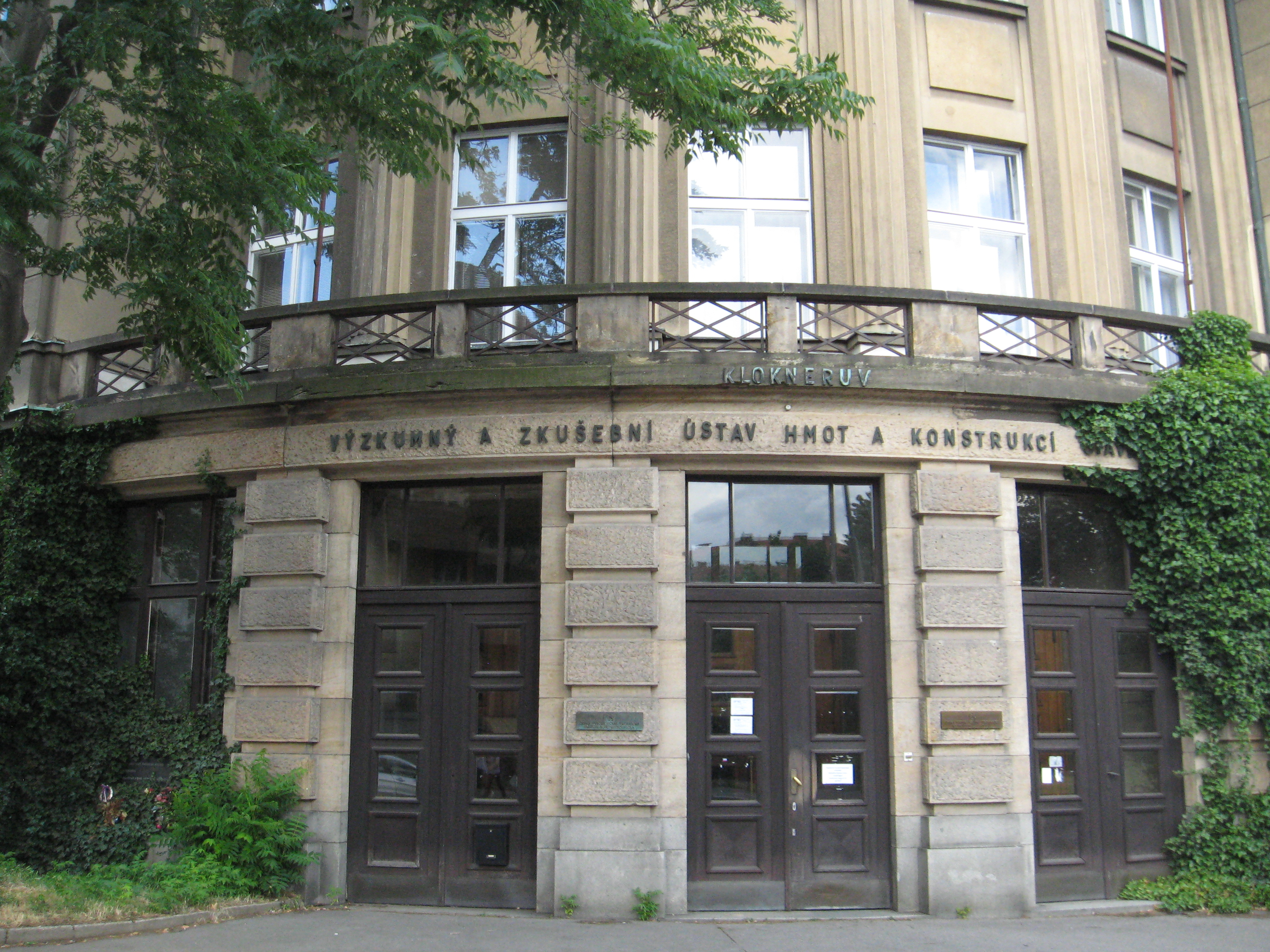 Detail vstupu do Kloknerova ústavu. Roh ulic Šolínovy a Zikovy u Vítězného náměstí, Praha 6. Fotografováno před převzetím (v červenci 2017) celé budovy původního Rektorátu ČVUT do majetku VŠCHT.